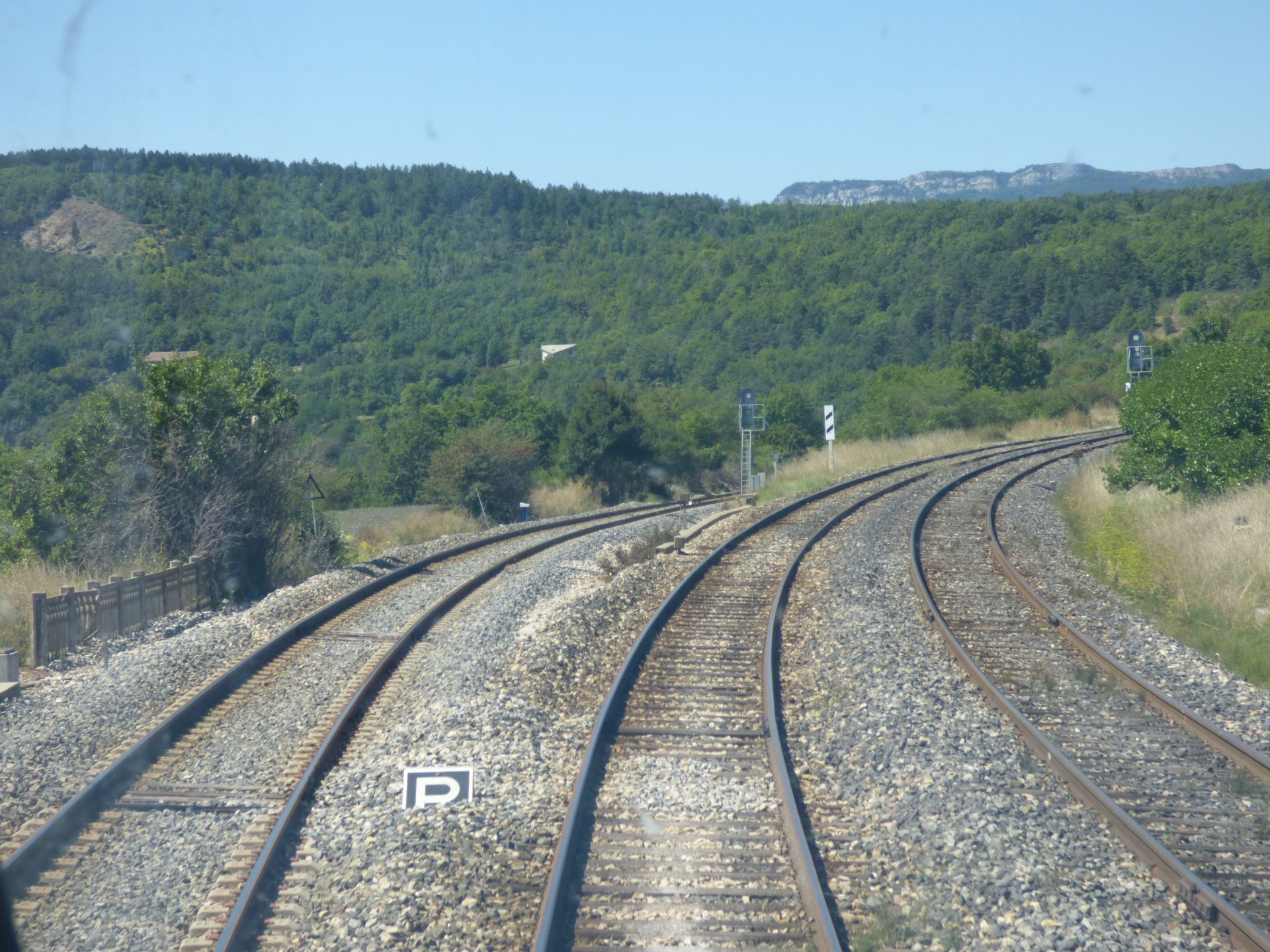 Bifurcation ferroviaire avec à gauche la direction de Marseille (13) et à droite Valence (26) et Grenoble (38)